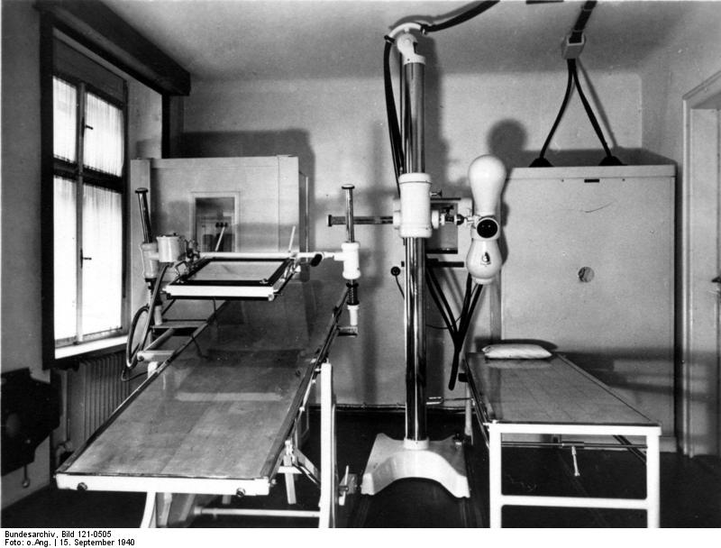 Polizeikuranstalt in Karlsbad, Röntgenraum